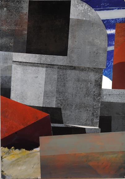 Infini solitude, 1993 von János Nádasdy, Serigraphie über Mixed Media auf Leinwand, 140 x 100cm